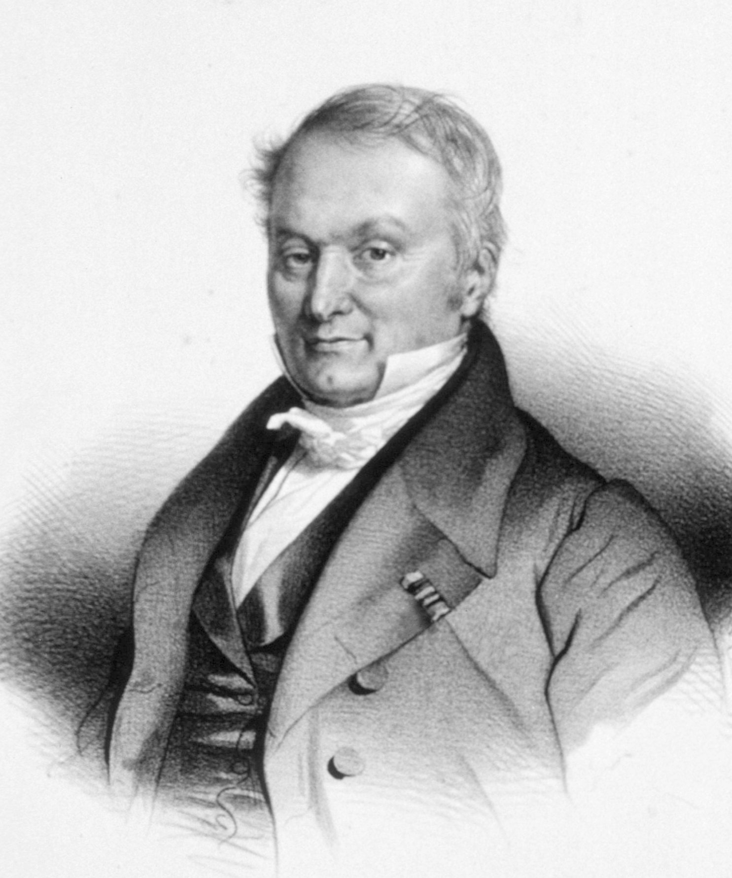 Portrait de Anthelme Richerand (1779-1840)